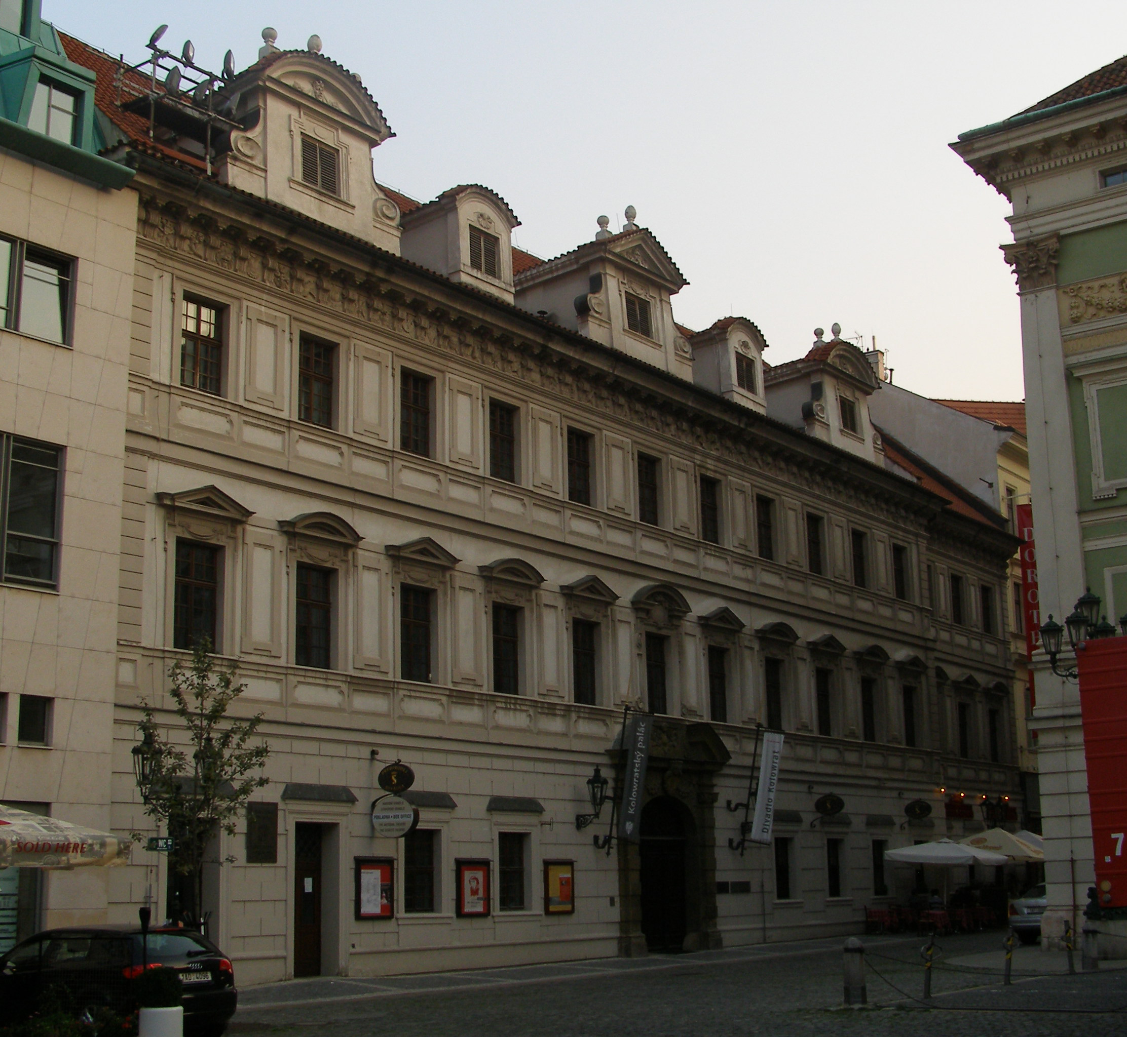 Palác Kolovratský (Staré Město), Praha 1, Ovocný trh 579/4, Staré Město